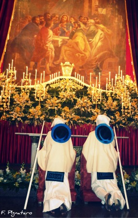 Questa immagine rappresenta una coppia di Perdoni dinanzi ad un Sepolcro a Taranto nel 2010.